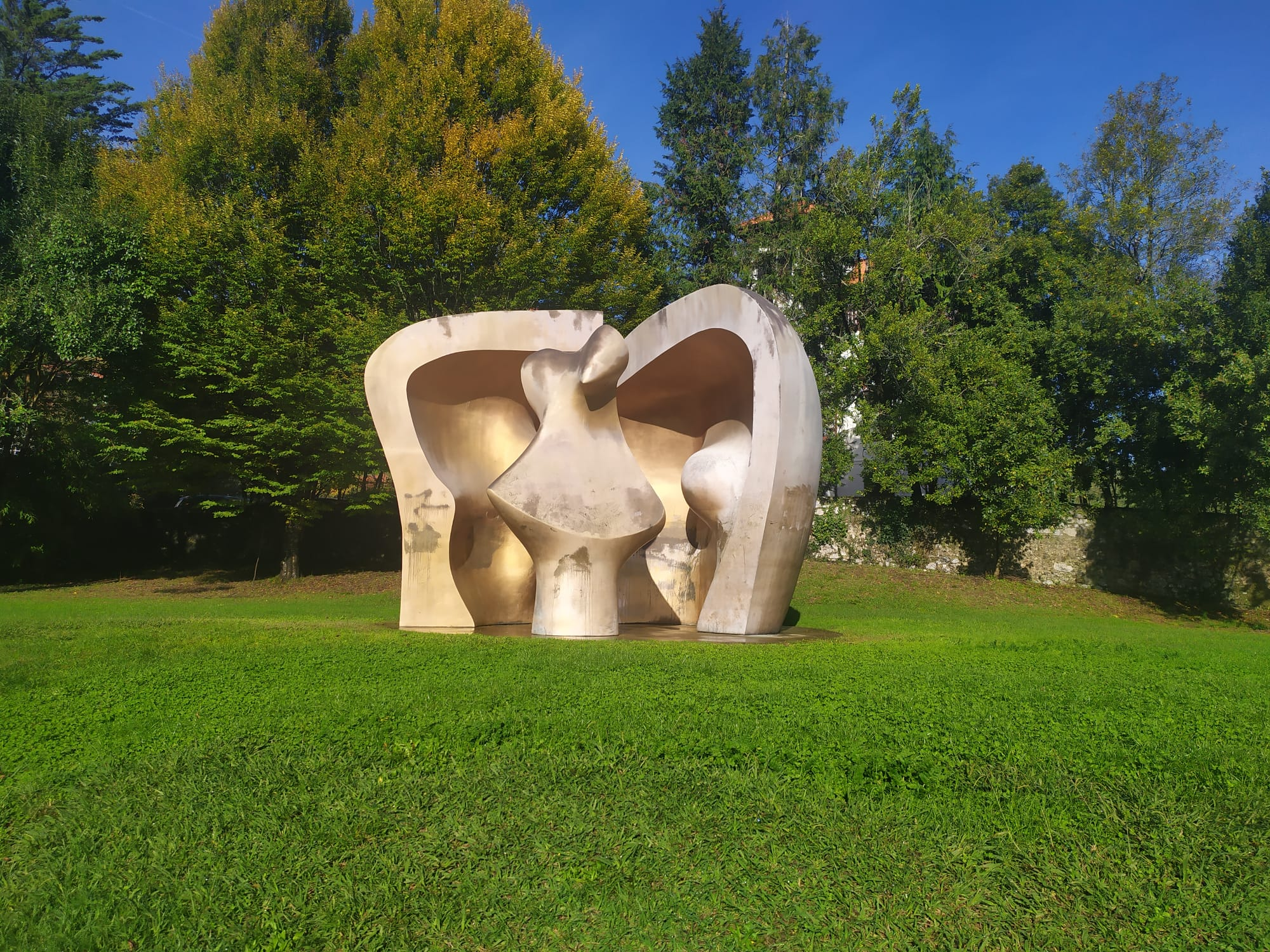 Obra de Henry Moore llamado "Figura Grande en un Refugio" situada en Gernika-Lumo.